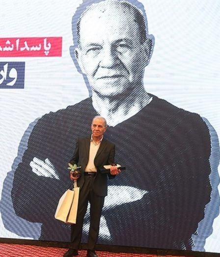 واروژ کریم‌مسیحی - مرداد ۱۳۹۸